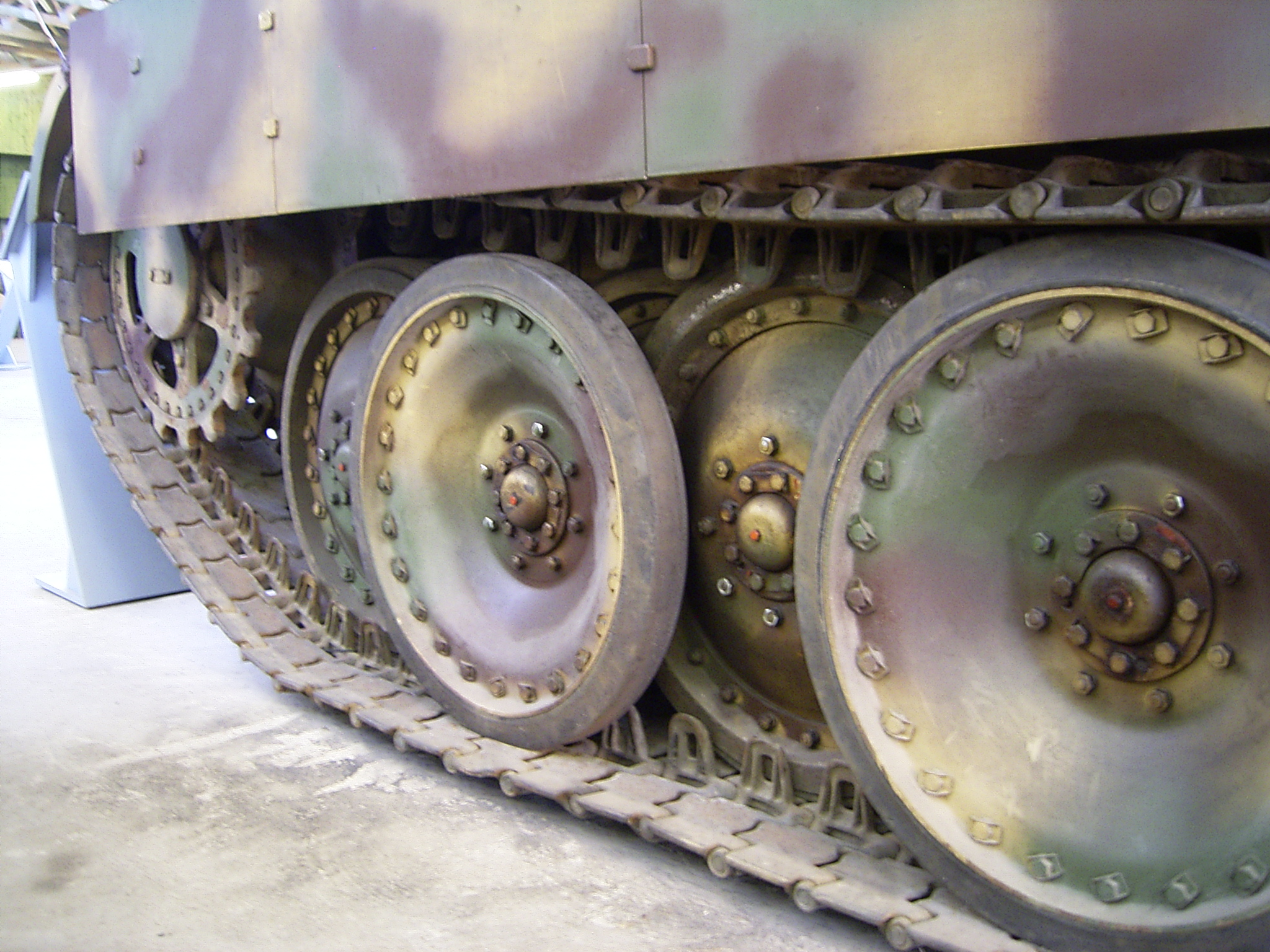 Detail des Laufwerks des Panzer V (Panther) im Deutschen Panzermuseum Munster.